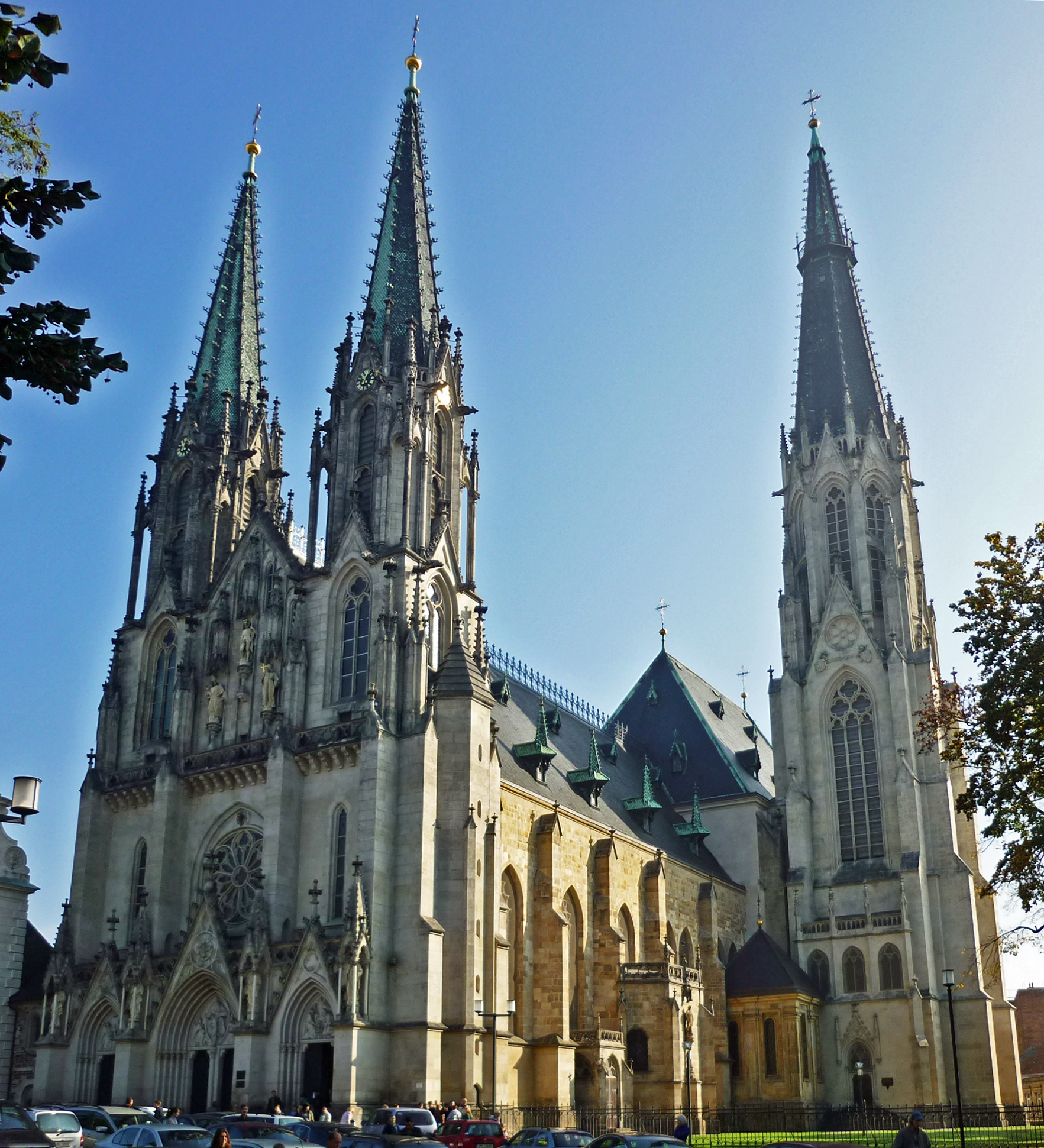 St. Wenzelskirche (Kathedrale) in Olmütz (Olomouc) in Mähren